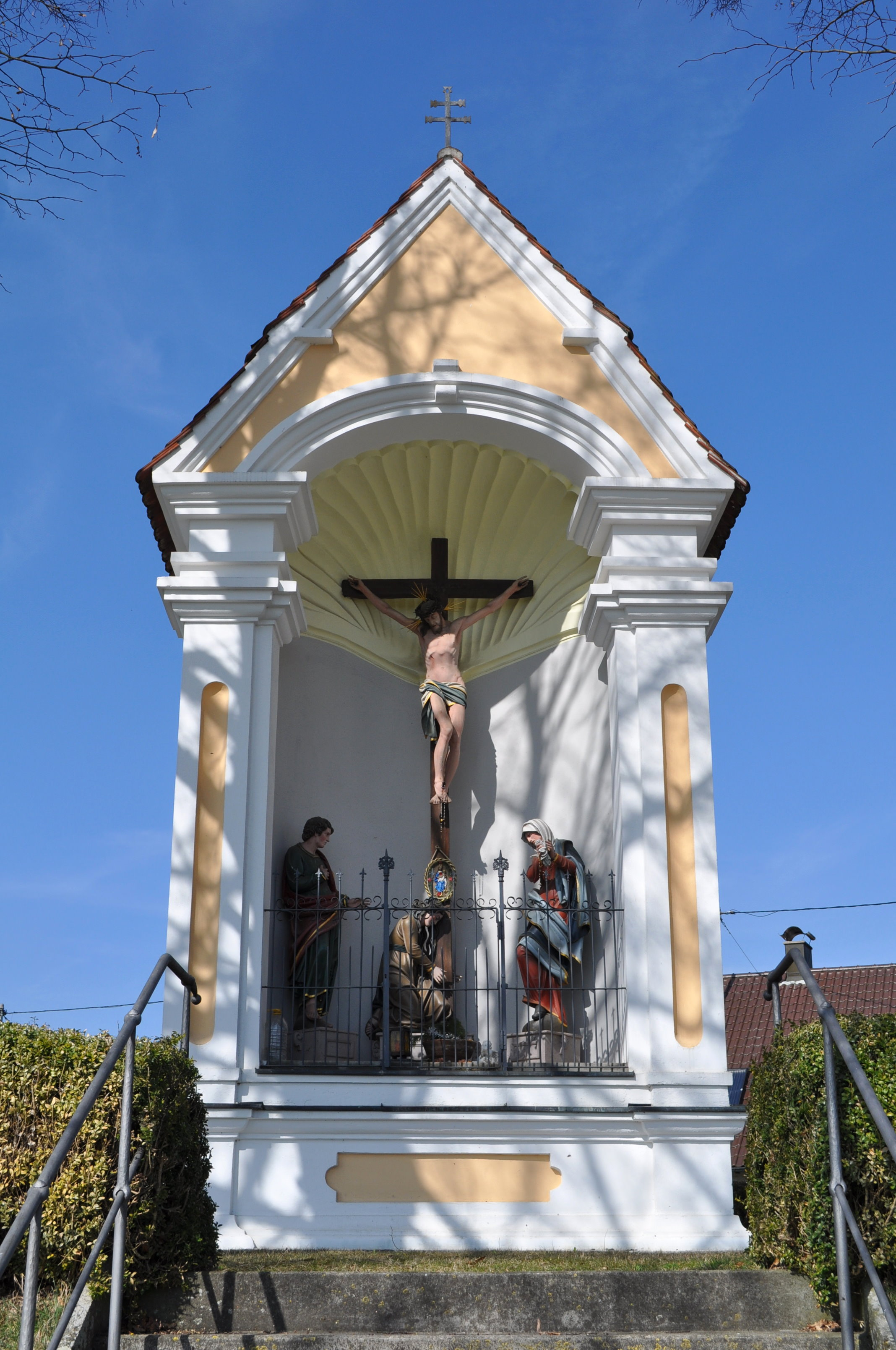 Pestkapelle am nordöstlichen Ortsausgang von Konzenberg